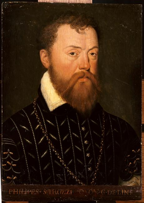 Ritratto di Piero Strozzi (o Pietro Strozzi) (1510 – Thionville, 21 giugno 1558) condottiero italiano, membro della famiglia patrizia fiorentina degli Strozzi, figlio di Filippo Strozzi e di Clarice de' Medici.